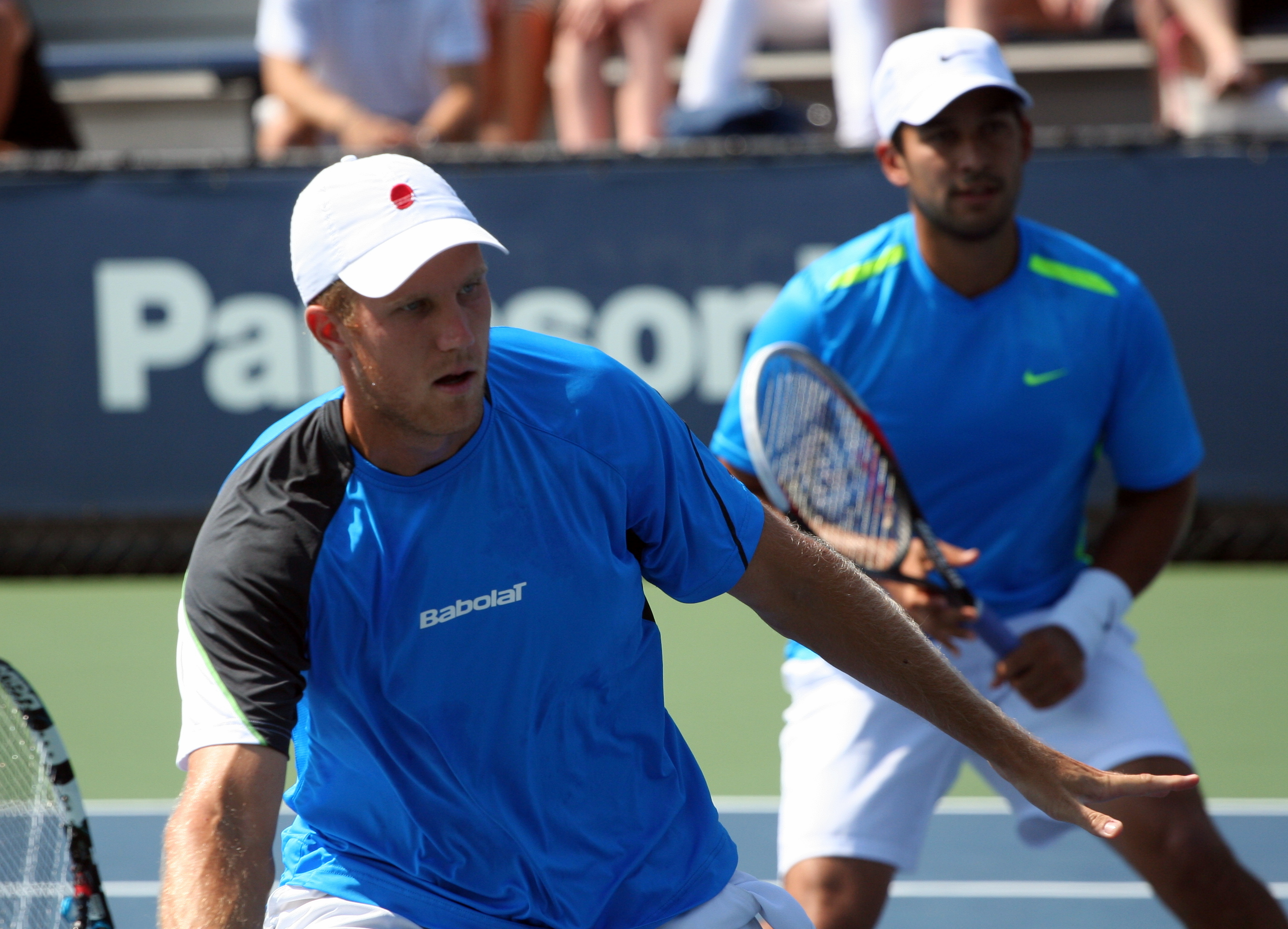 U.S. Open Saturday, Sept. 1, 2012